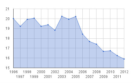 Porcentaje de la producción científica mexicana en la producción científica total de América Latina.